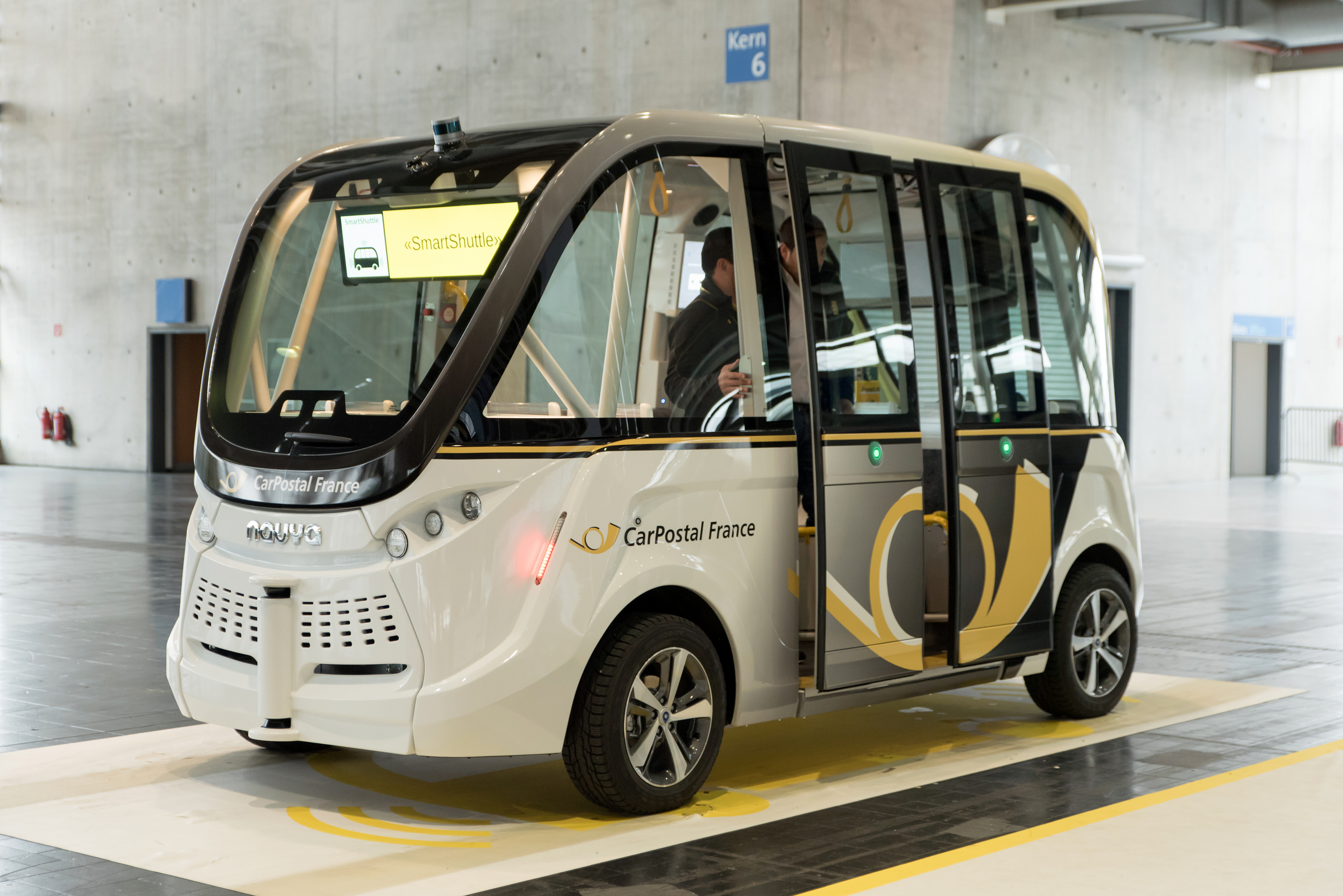 Nayva Arma bei der CeBIt 2017